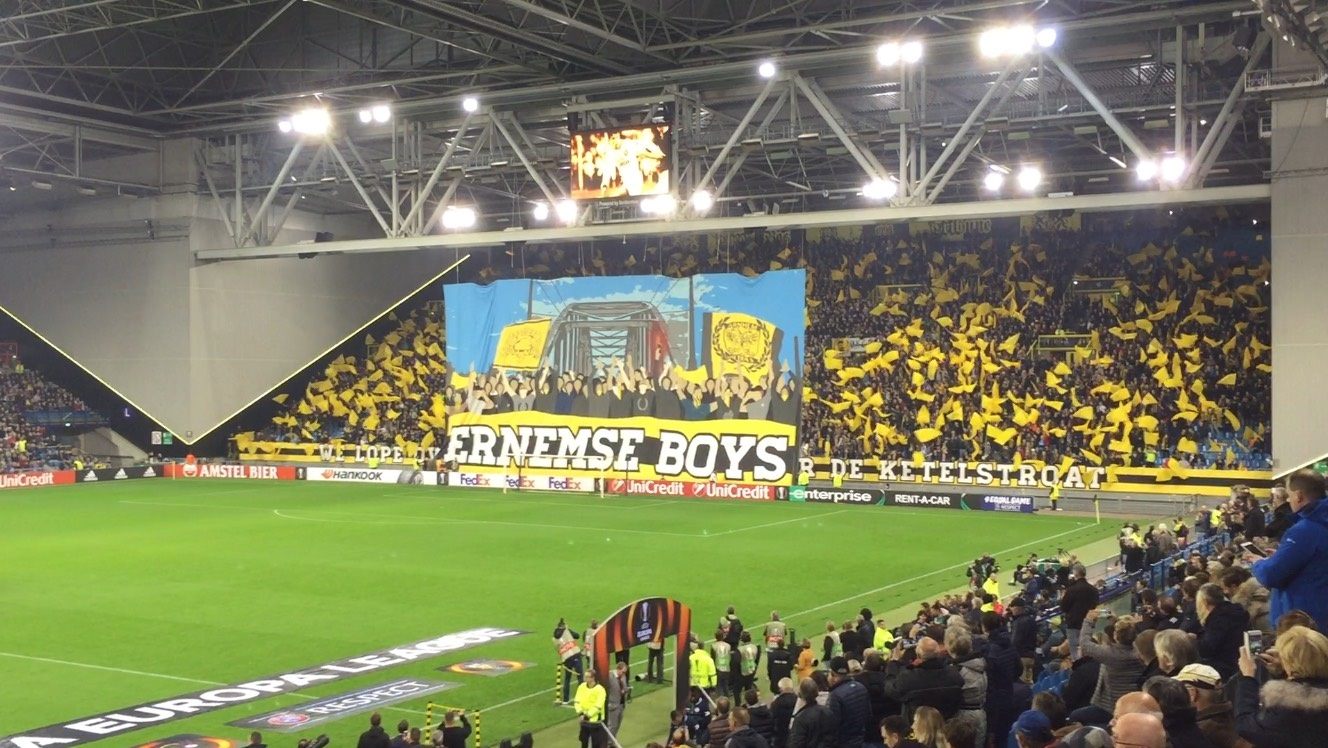 Sfeeractie (Ernemse boys)